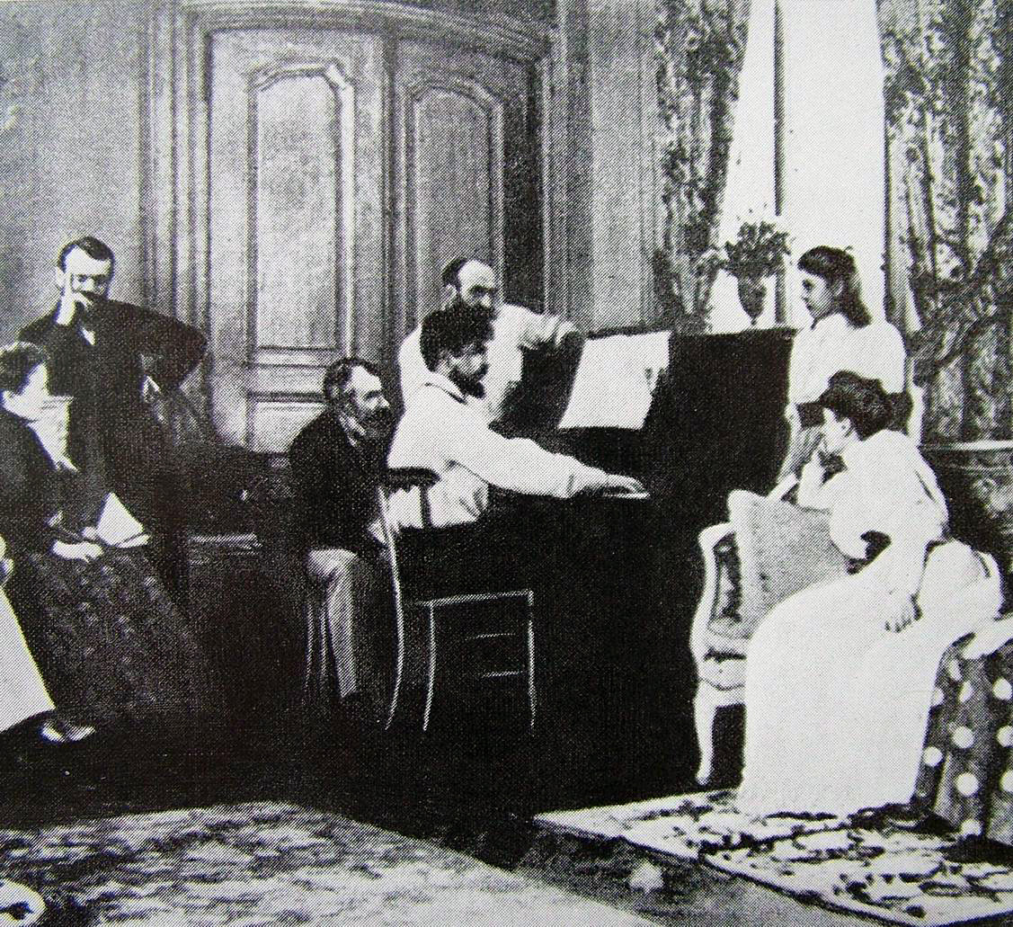 Дебюсси в салоне Шоссона играет "Бориса Годунова" Мусоргского. Фотография 1893 года (Дебюсси за роялем, Шоссон стоит сразу за ним)